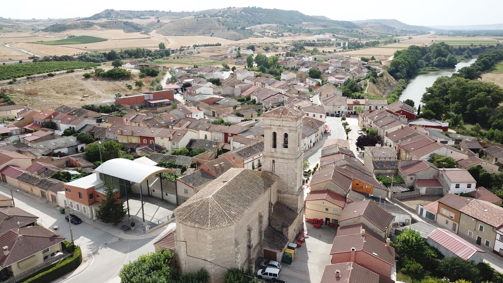 Vista aerea de Quintanilla de Arriba